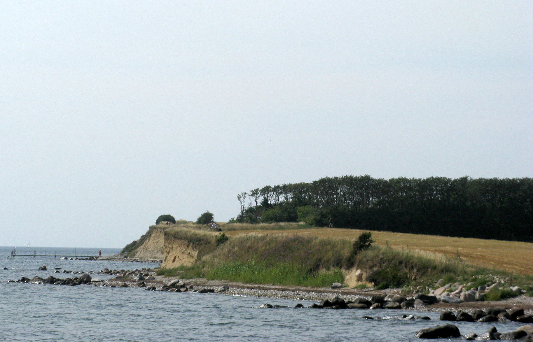 Enø syd for Karebæksminde ved Næstved, på Sjælland i Denmark